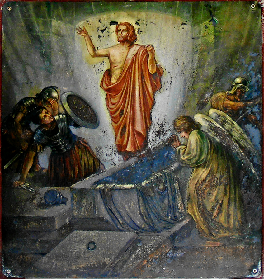 Bildtafel des Bildstocks XI der Geheimnissäulen auf dem Weg nach Maria Plain, Bergheim, Land Salzburg, Österreich